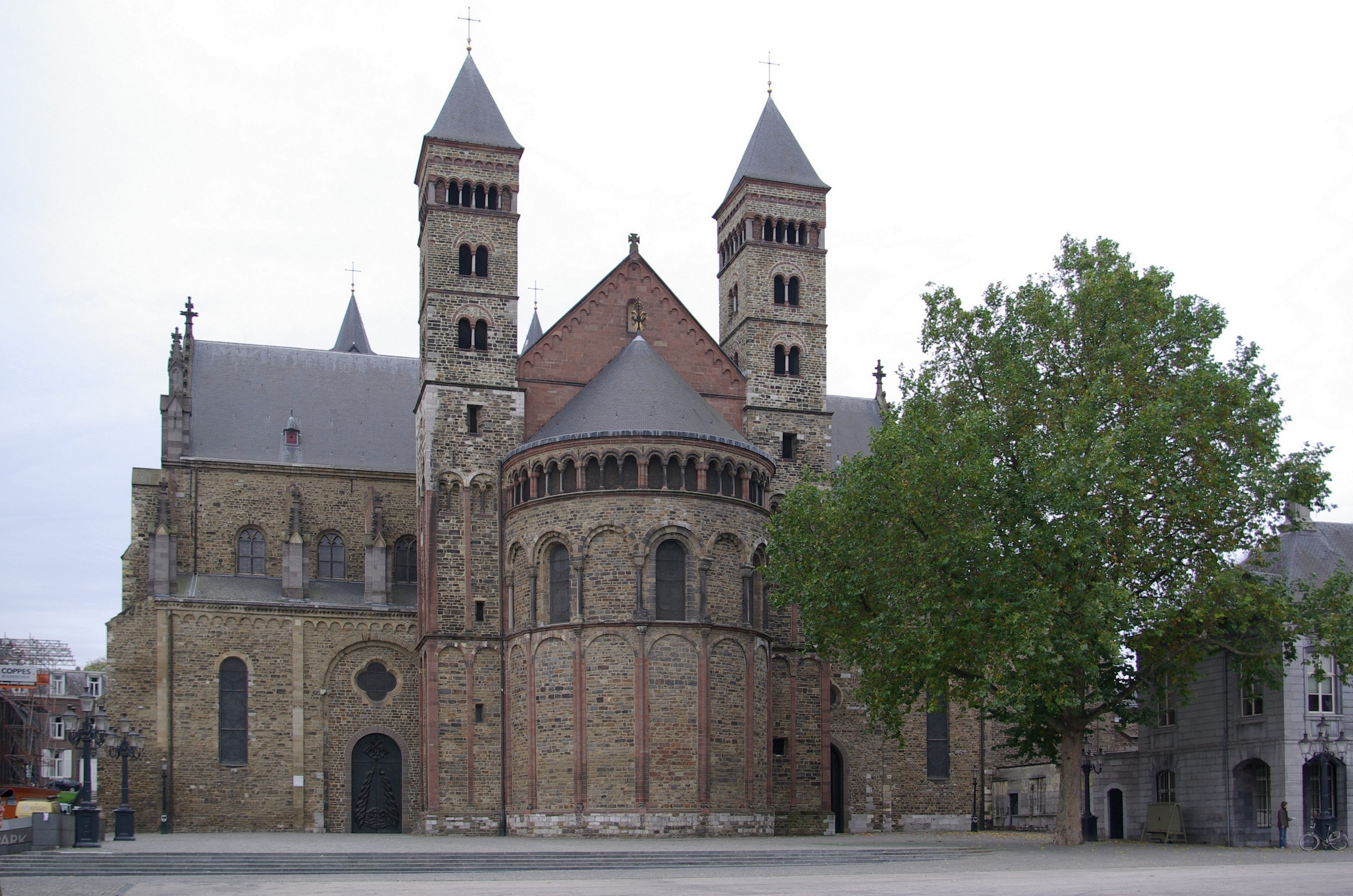 Maastricht, St Servaas